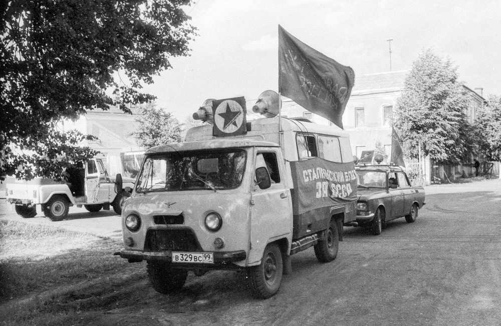 Участники общественно-политического движения «Трудовая Россия» и Виктор Иванович Анпилов приехали в Переславль в рамках «похода трудового народа за СССР» от Бреста до Курильских островов. Переславские ветераны встретились с ними на собрании в культурном центре «Ювента». Лозунг «Сталинский блок за СССР» напоминает о политическом объединении, куда вошли «Трудовая Россия» (Анпилов), Союз офицеров (Терехов), движение «Союз» (Тихонов) и Народно-патриотический союз молодежи (Маляров). Активисты приехали на автомобиле УАЗ-3303 госномер В329ВС99 (принадлежит Вере Емельяновне Анпиловой) и АЗЛК-2140 госномер Р930СТ50. Переславль, Народная площадь.